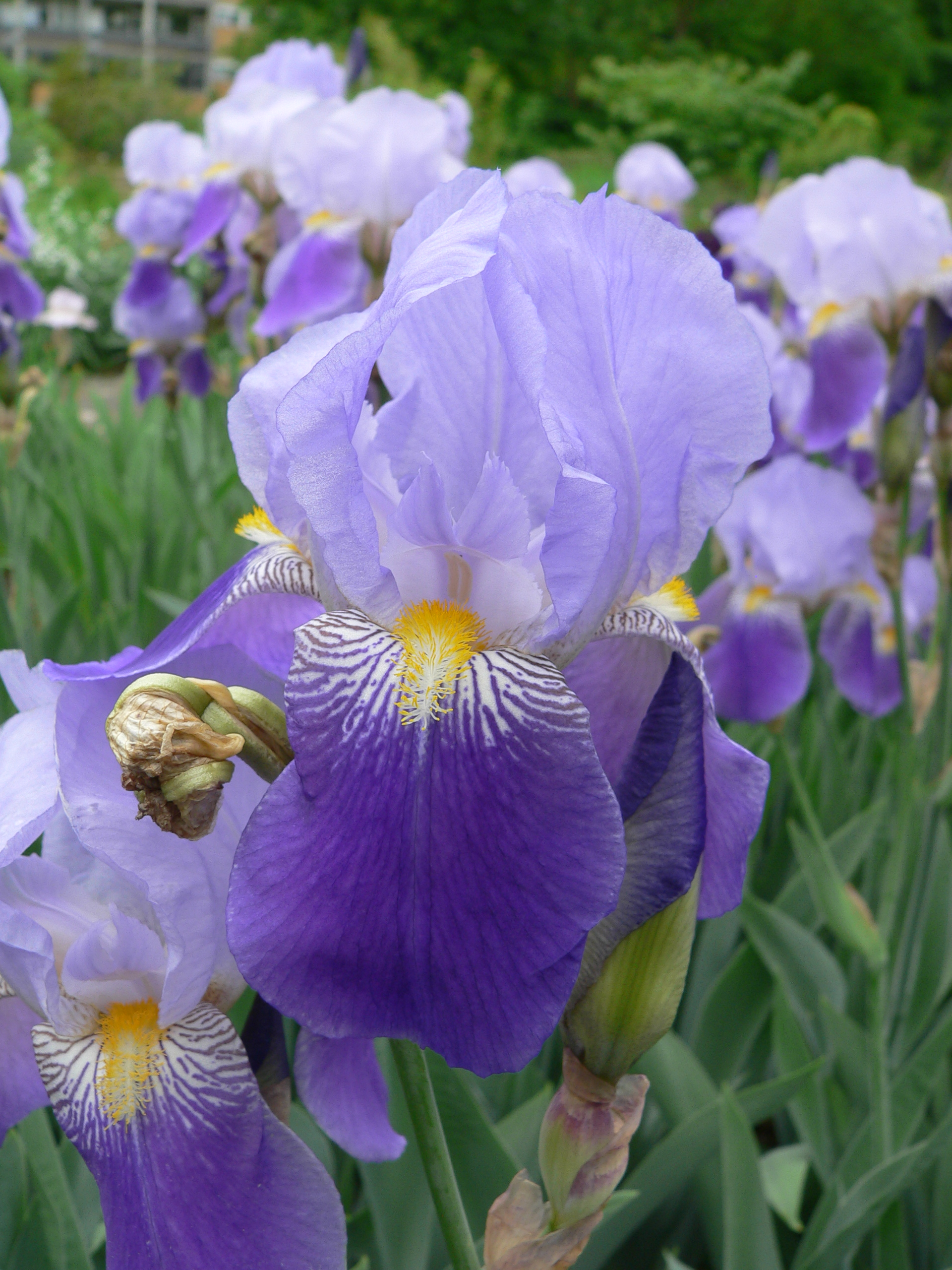 Iris 'Gene Wild'